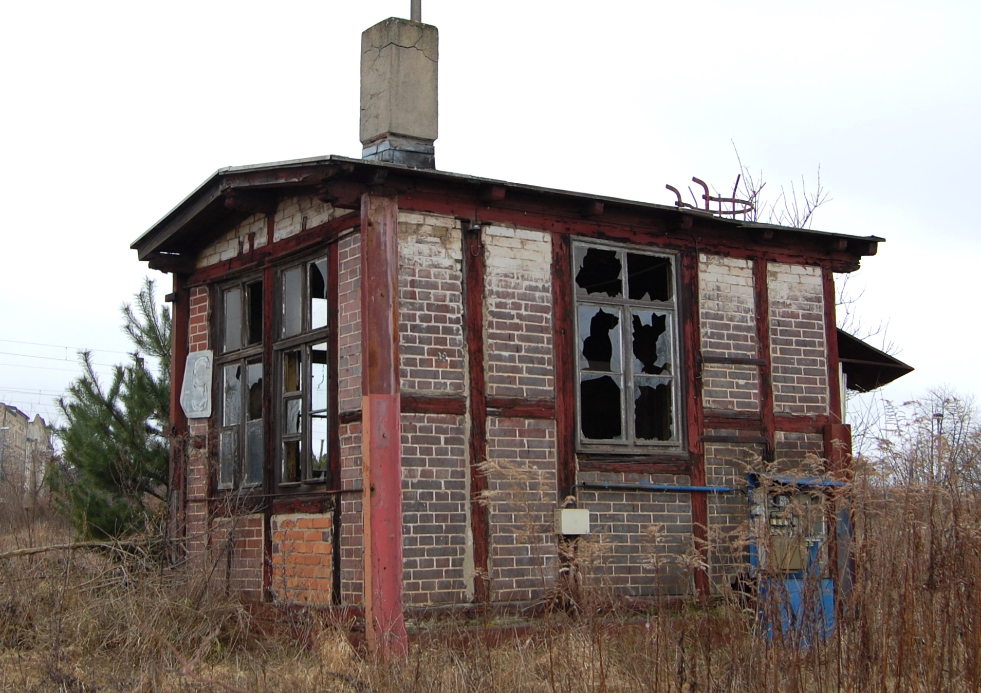 Stellwerk auf dem Gelände des RAW Salbke